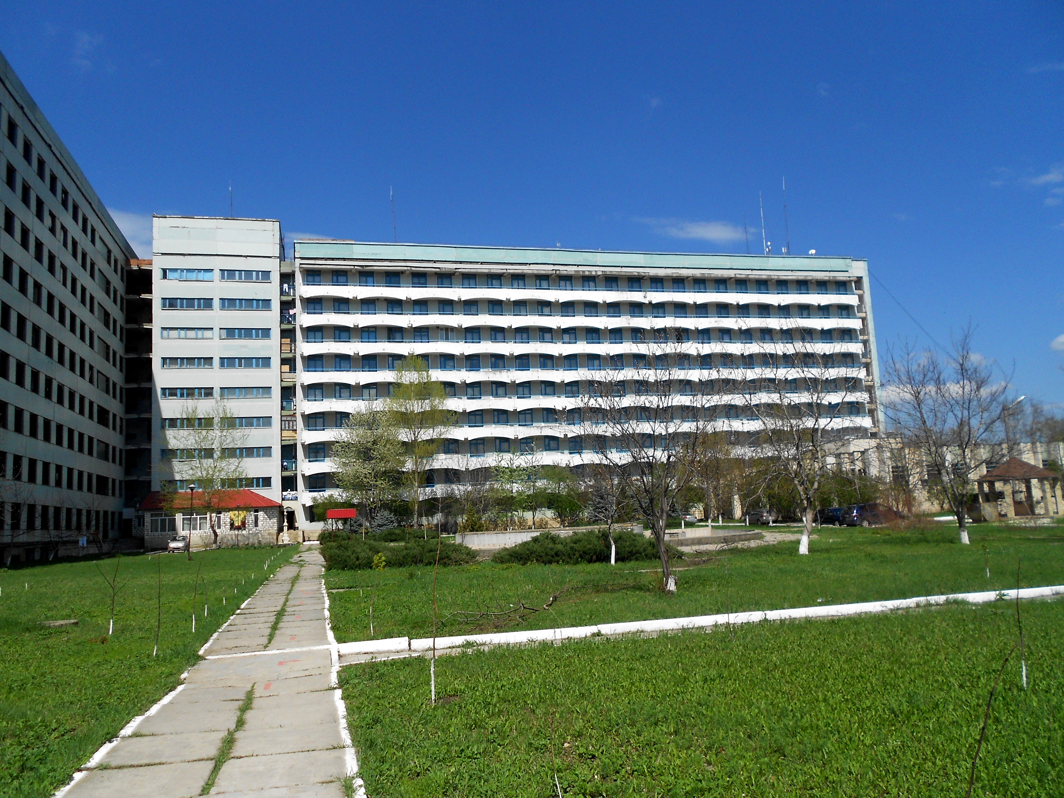 Spitalul Clinic Municipal Bălți